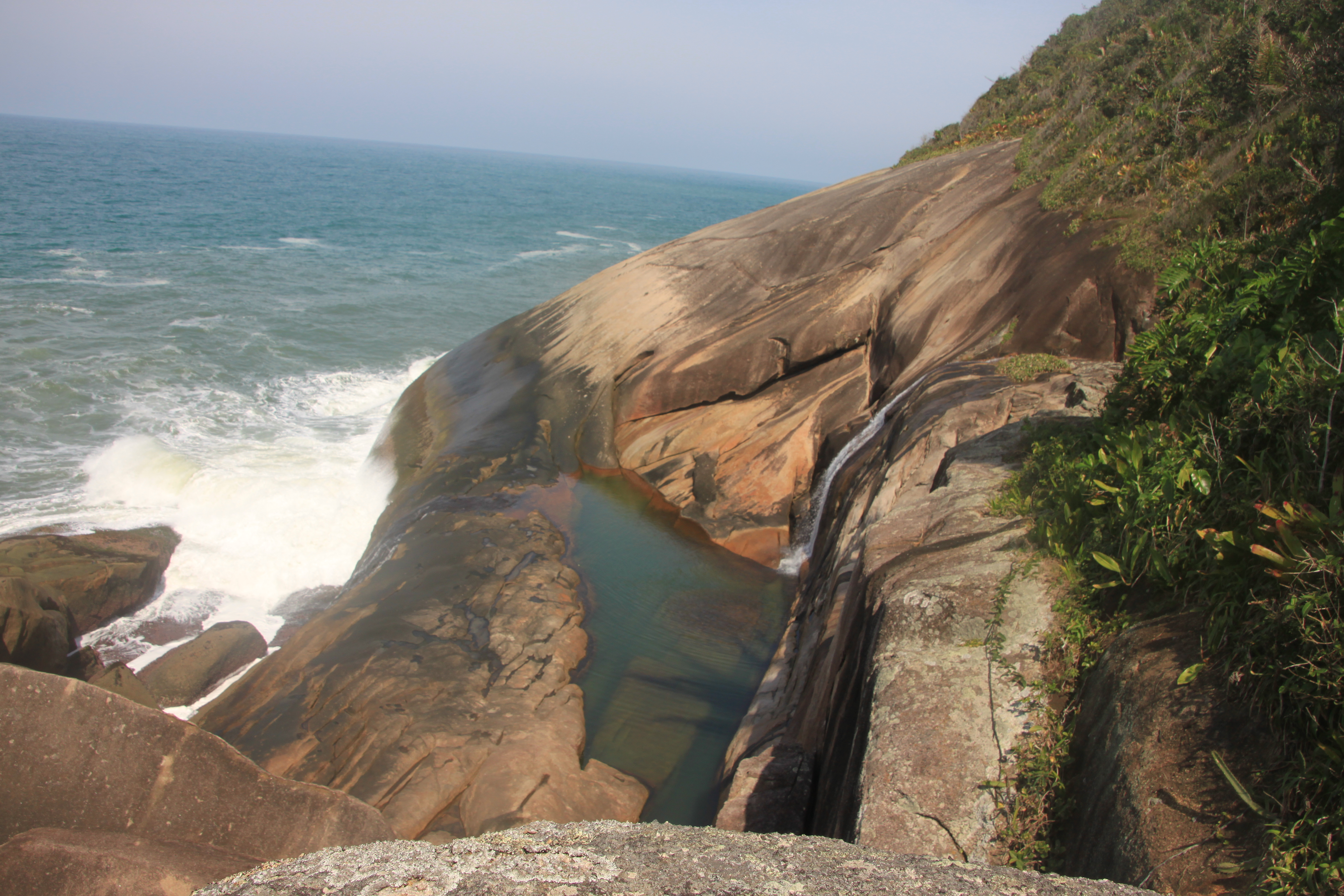 Linda cachoeira formando uma piscina natural antes de se jogar no mar, na reserva ecológica de Juatinga